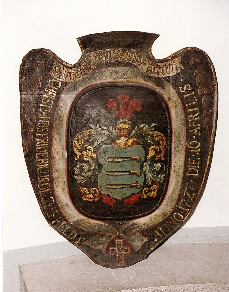 Familievåbenskjold på Frederiksborg Slot. Tilhørende generalløjtnant Christian Friedrich v. Staffeldt, f. 1671, d. 1741.